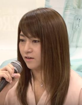 2017.7.4 スターダム記者会見